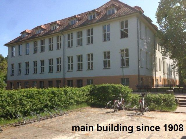 המבנה המרכזי של הכפר שניהל סאלי ביין ומשמש כיום את בית הספר שעל שמו